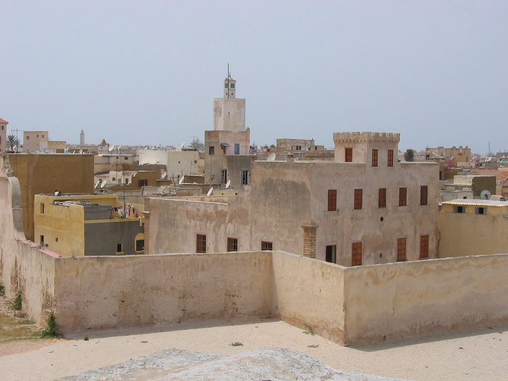 Khalid Boudrari, Medina